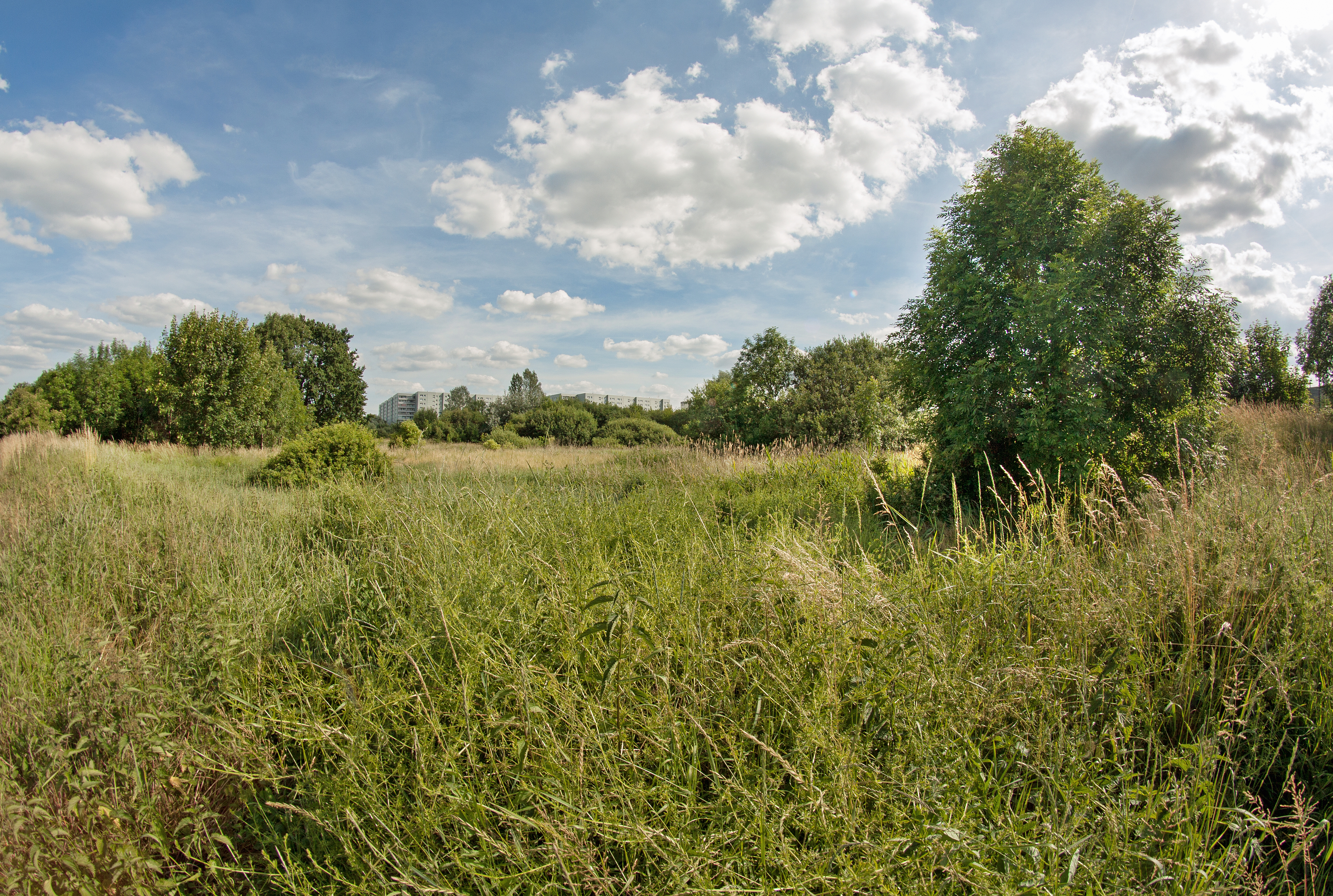 NSG Nr. 26 in Berlin, Wartenberger Luch, Blick auf Neubaugebiet